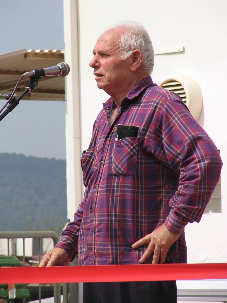 גדעון גולן מסביר על תהליך הקמת מפעל בקרה, שהיה אחד משלושת מקימיה.